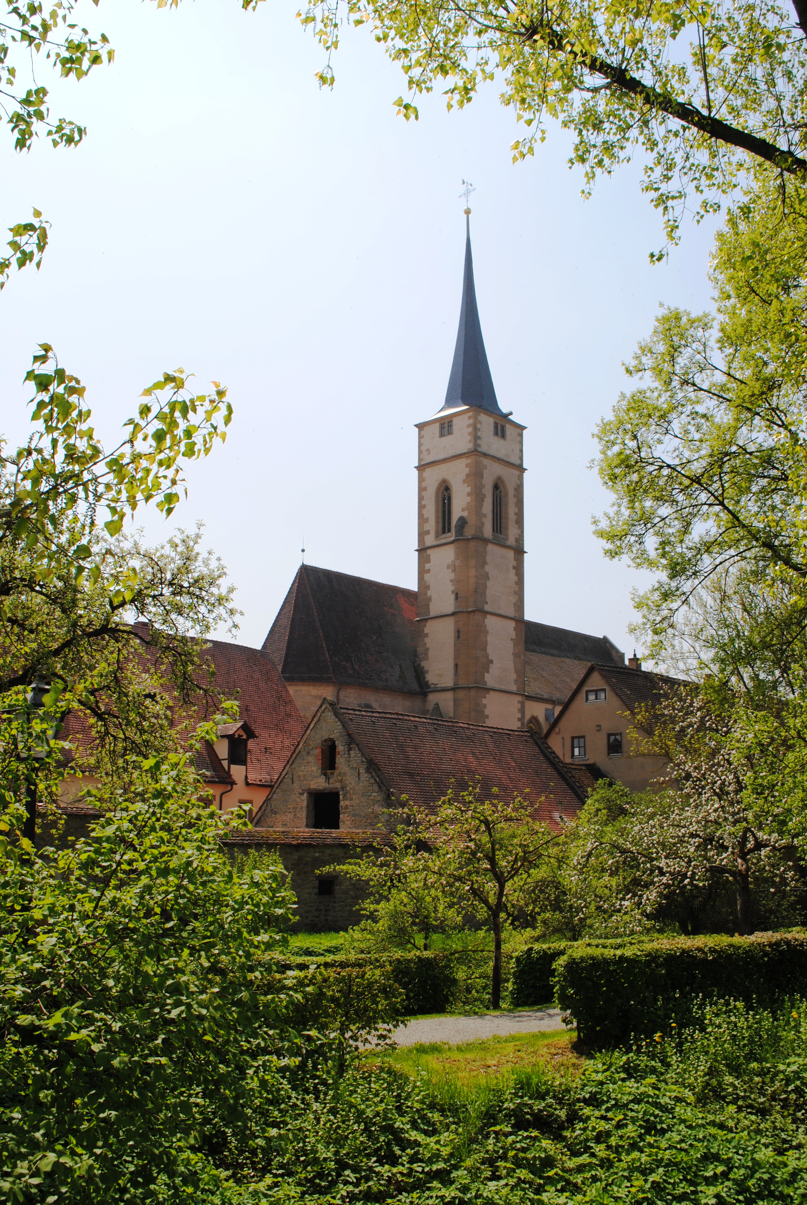 St. Veit, Gesamt, Iphofen